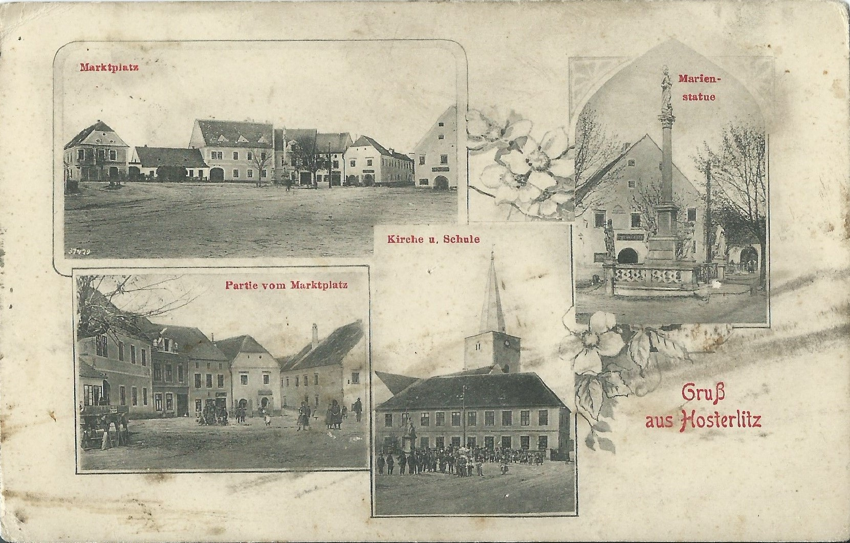 Postkarte "Gruß aus Hosterlitz" mit Dorfszenen aus dem Jahr 1915